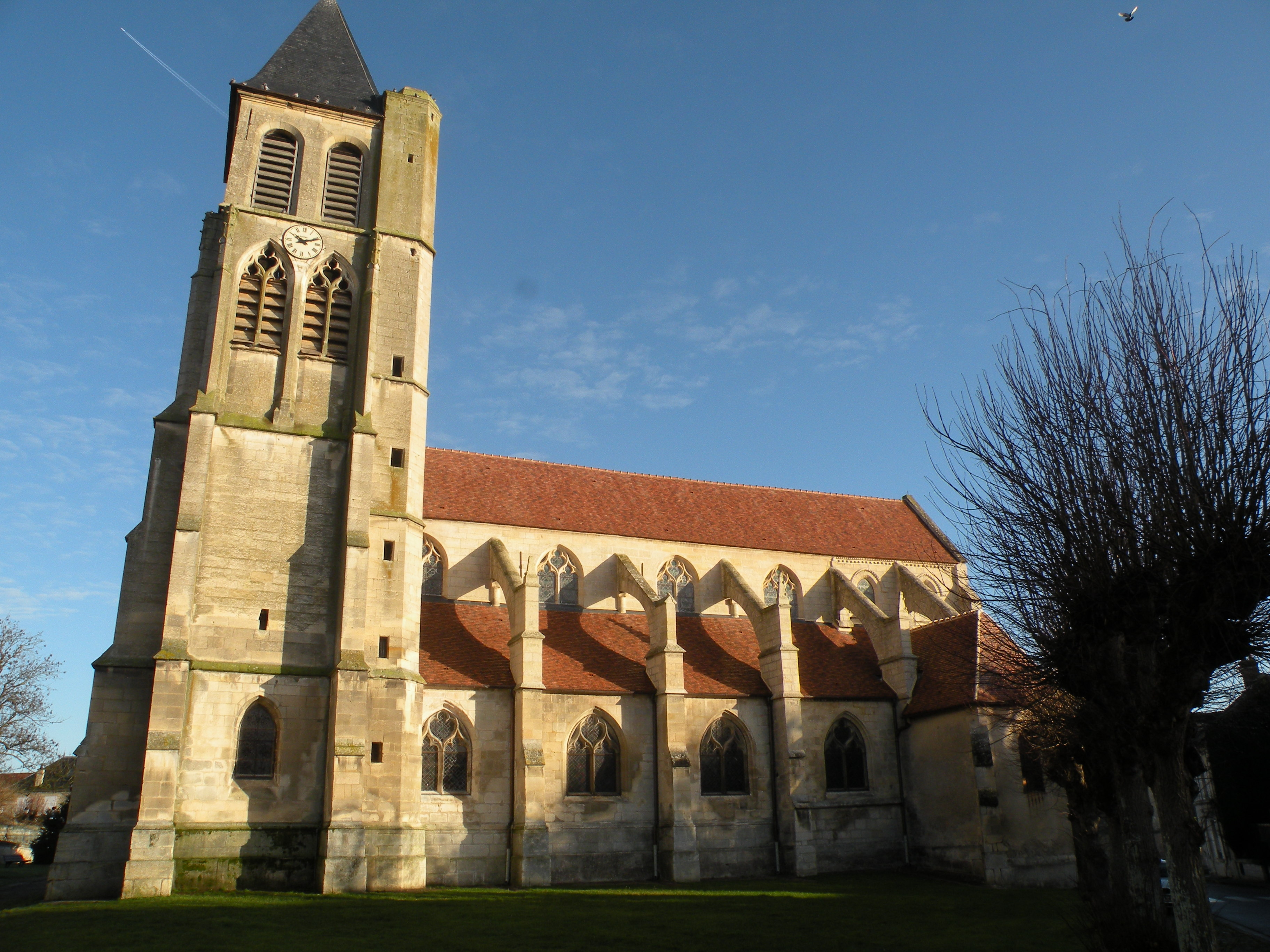 Église Saint-Pierre-et-Saint-Paul de Précy-sur-Oise, exterieur.